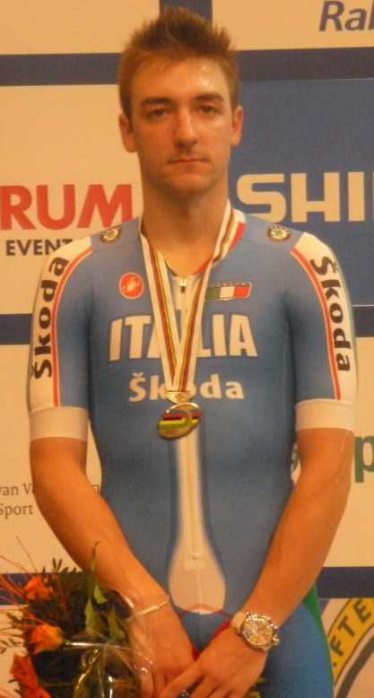 Elia Viviani, italienischer Radrennfahrer